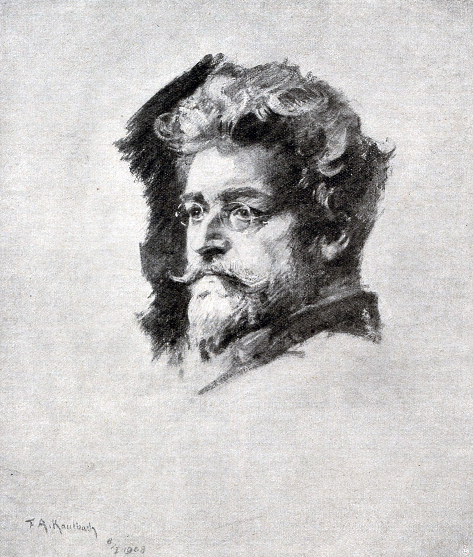 Pastell des Schriftstellers Ludwig Ganghofer von Friedrich August von Kaulbach (1908)